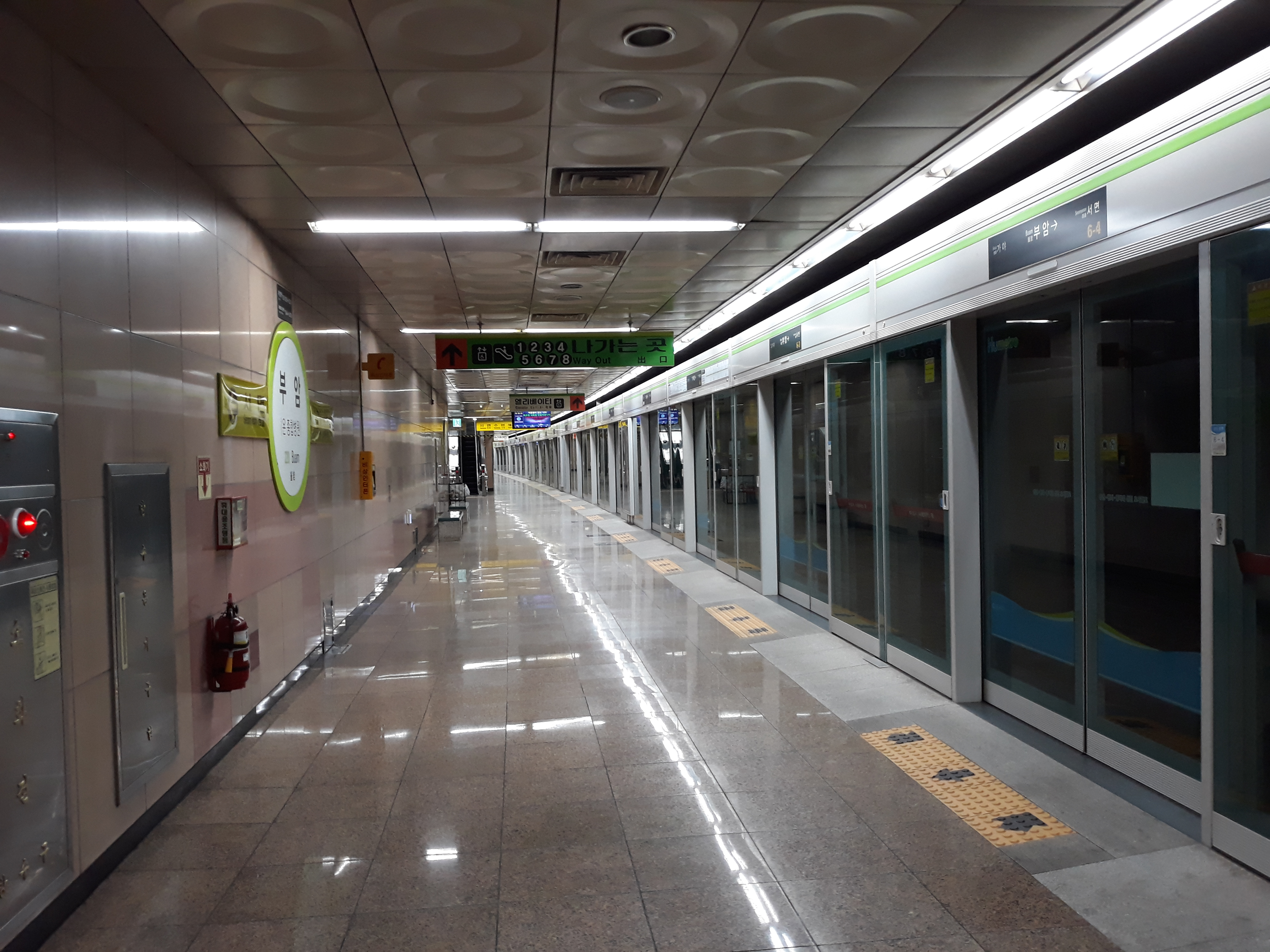 부산 도시철도 2호선 부암역 장산 방면 승강장